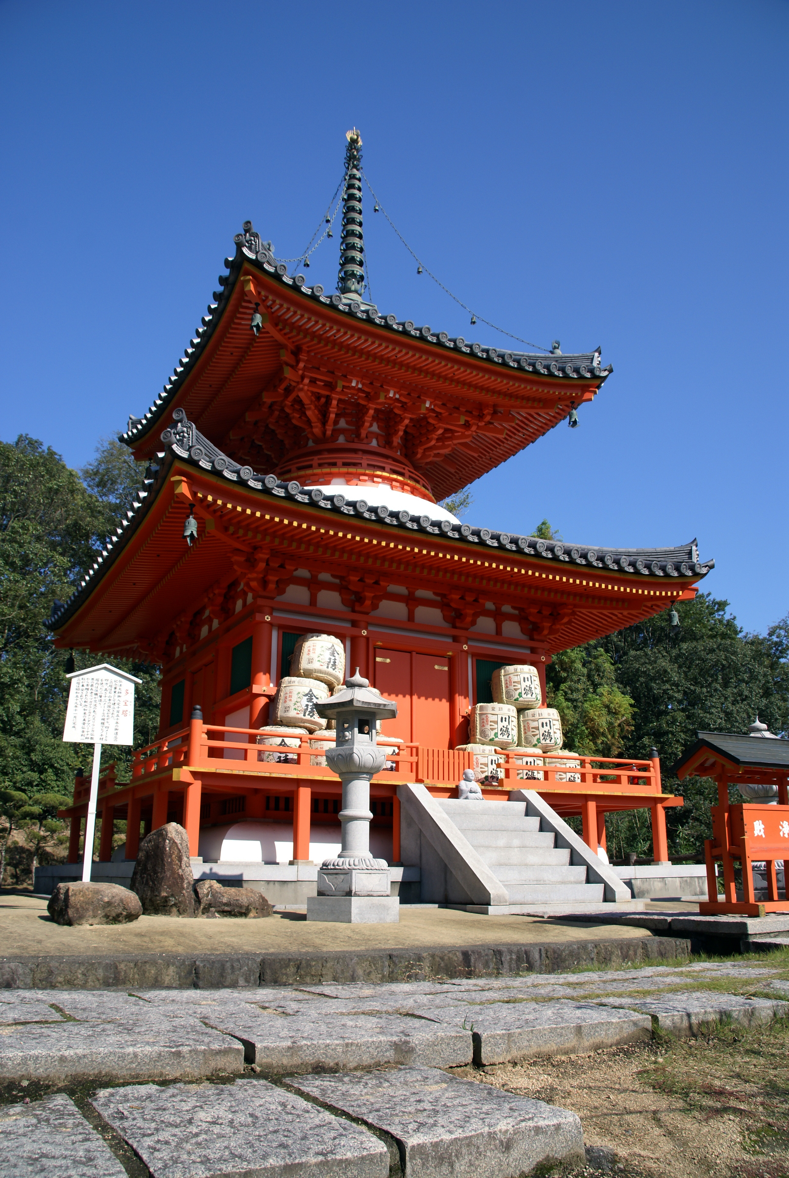 Yodaji in Higashikagawa, Kagawa prefecture, Japan